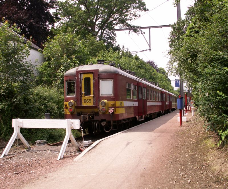 Bahnstrecke Verviers - Spa (Ligne 44), Belgien